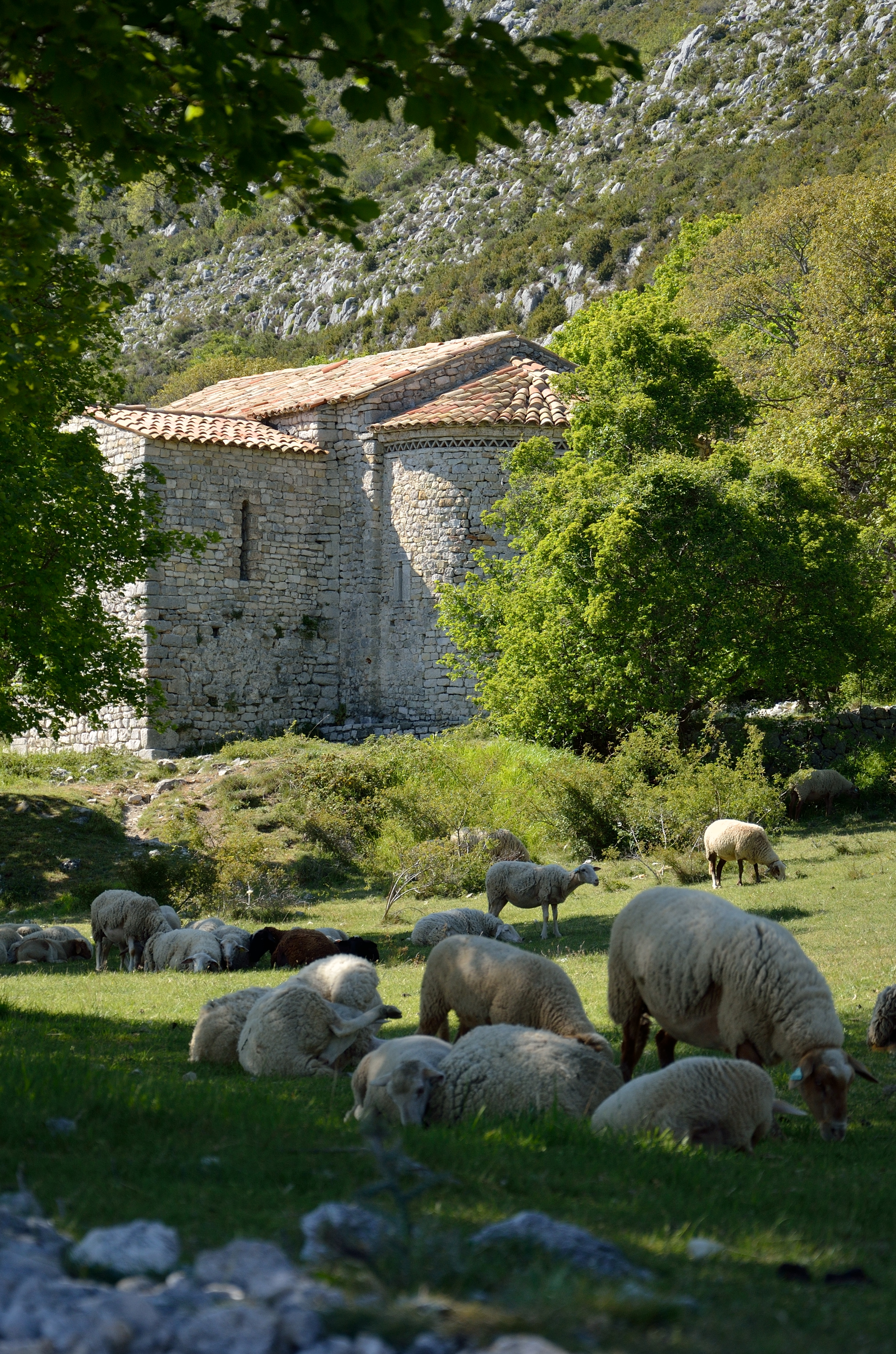 La chapelle Saint-Michel, à l'écart du village de Coursegoules (Alpes-Maritimes)